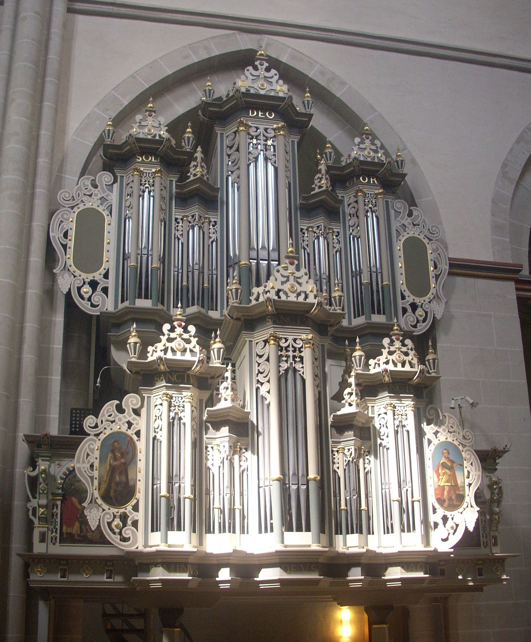 Riddagshausen Klosterkirche, Orgel